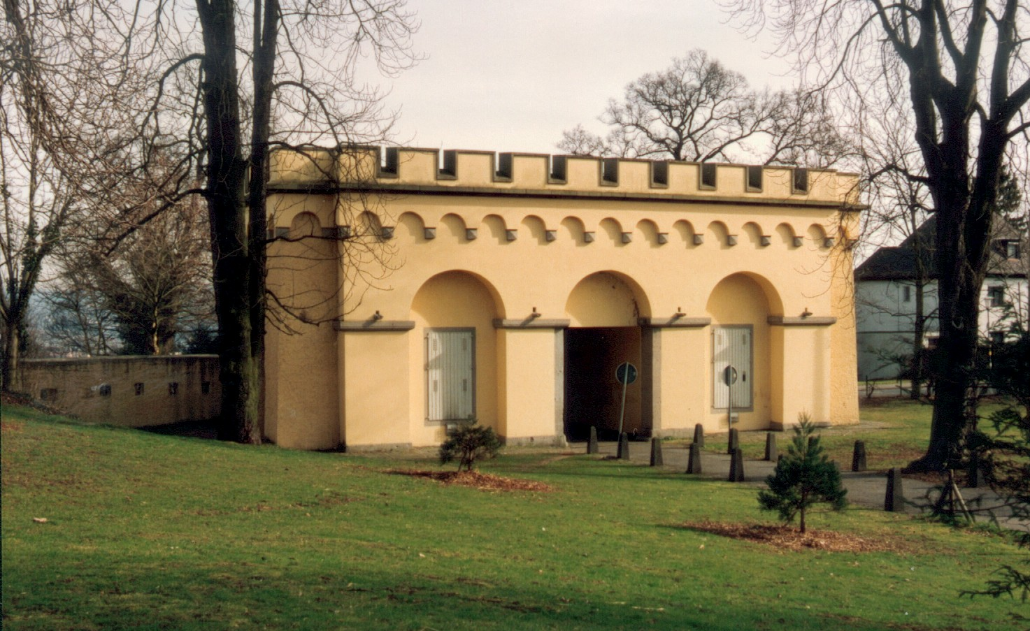 Rückseite Löwentor (Haupteingang) der Feste Kaiser Alexander in Koblenz